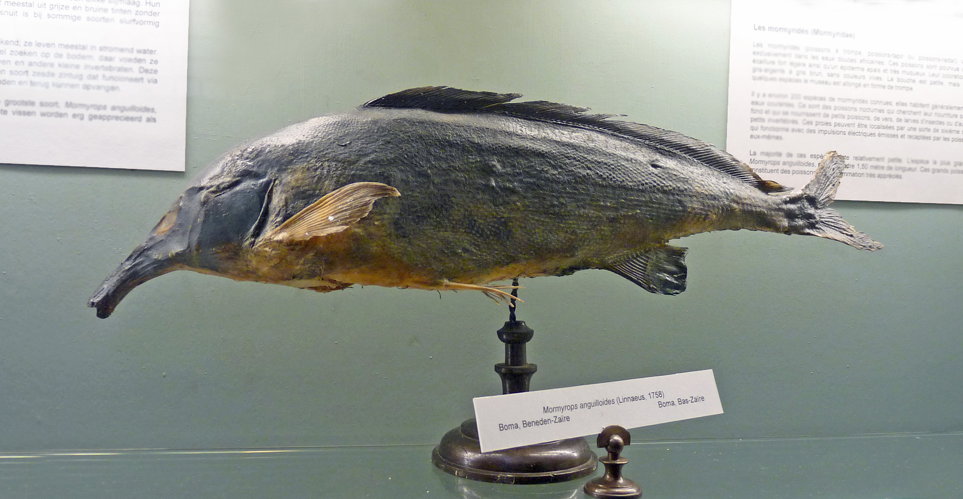 Mormyrops anguilloides (Boma, Bas-Zaïre) au Musée royal de l'Afrique centrale